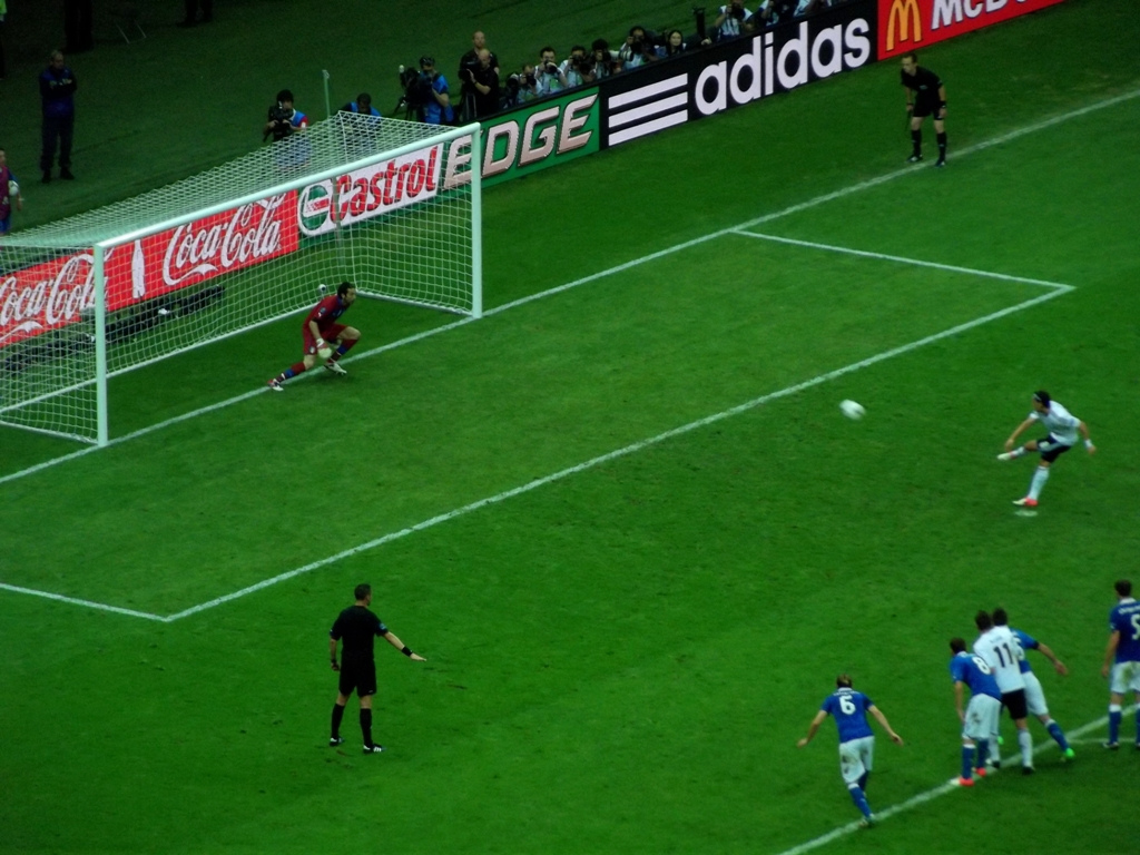 Zdjęcie zrobione w dwudziestym pierwszym dniu UEFA Euro 2012 w Warszawie, meczu półfinałowego Niemcy-Włochy.